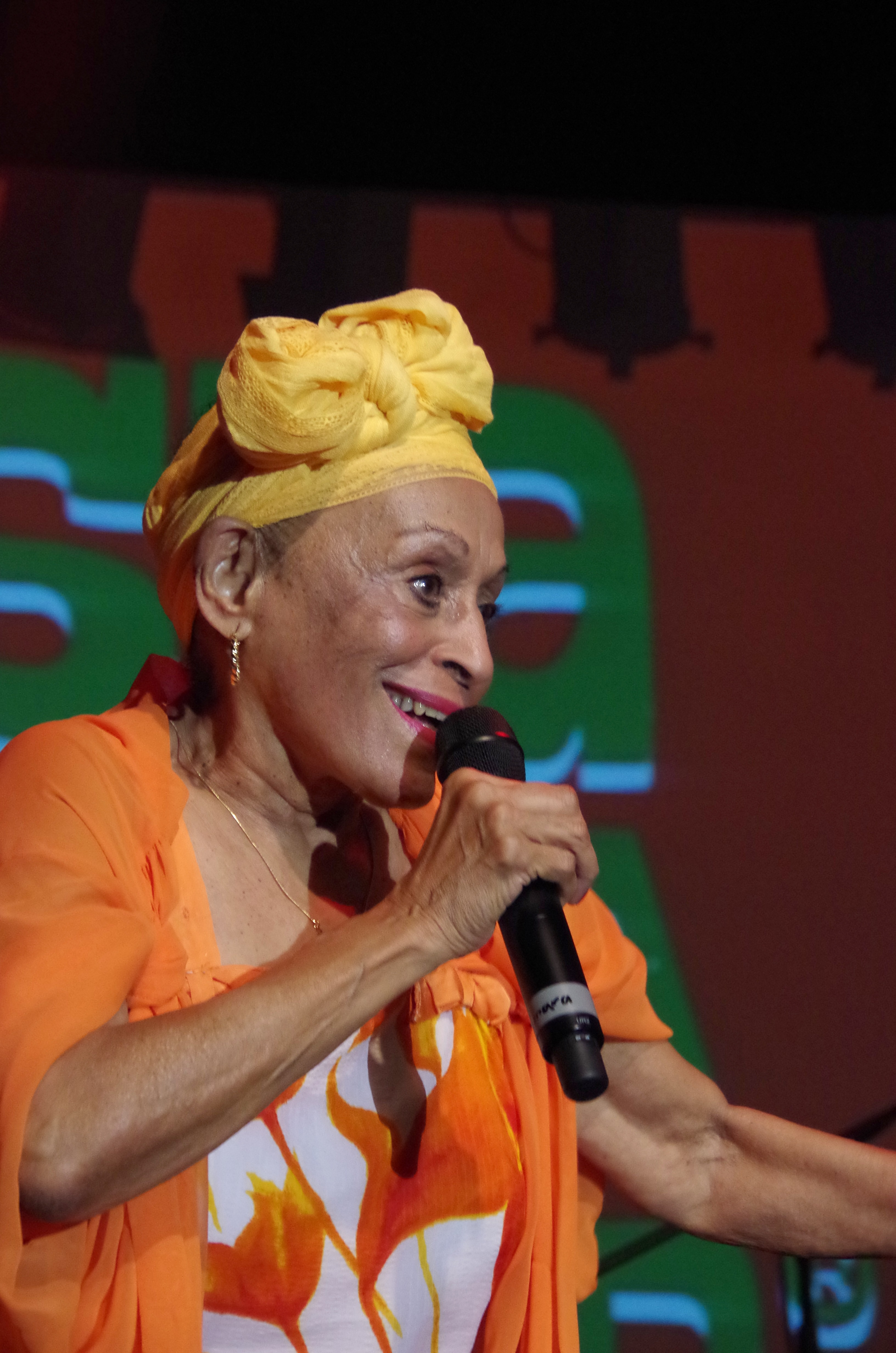 Das Zelt-Musik-Festival 2015 in Freiburg im Breisgau. 06.07.2015 Orquesta Buena Vista Social Club Omara Portuondo